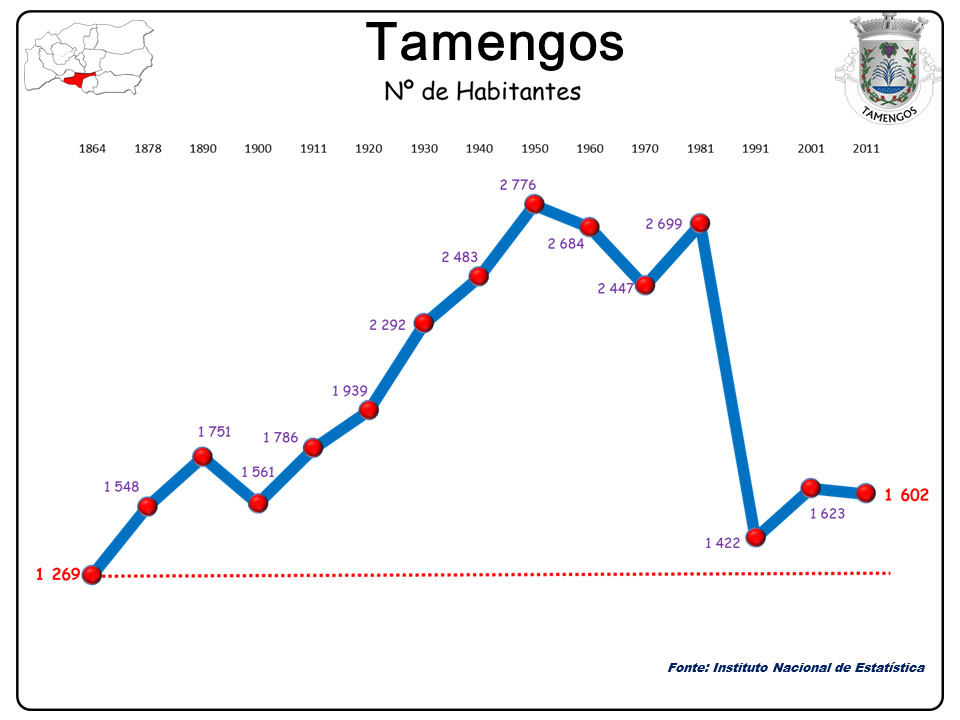 Freguesia